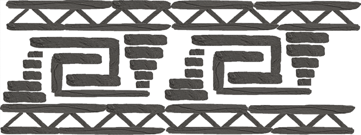 Gran Pajaten